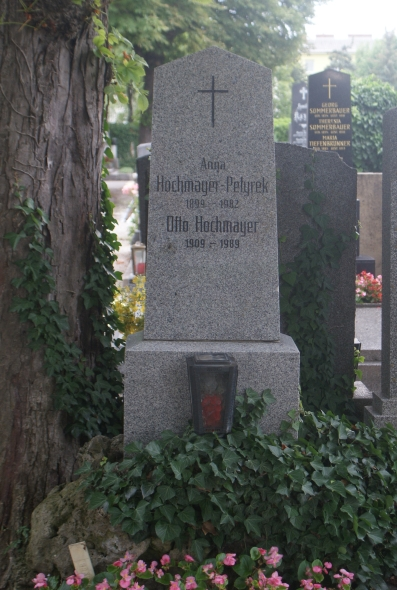 Friedhof Perchtoldsdorf-Felix Petyrek